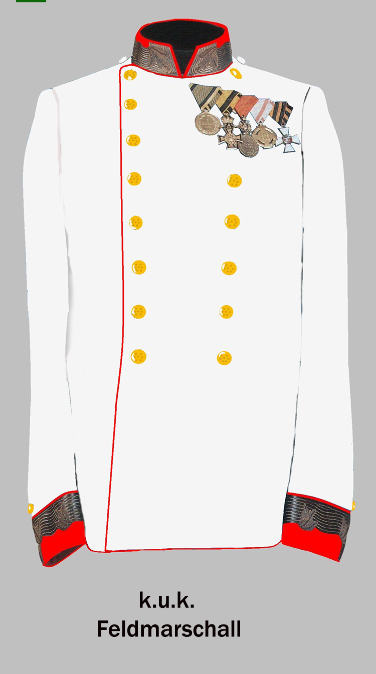 Galawaffenrock eines k.u.k. Feldmarschalls